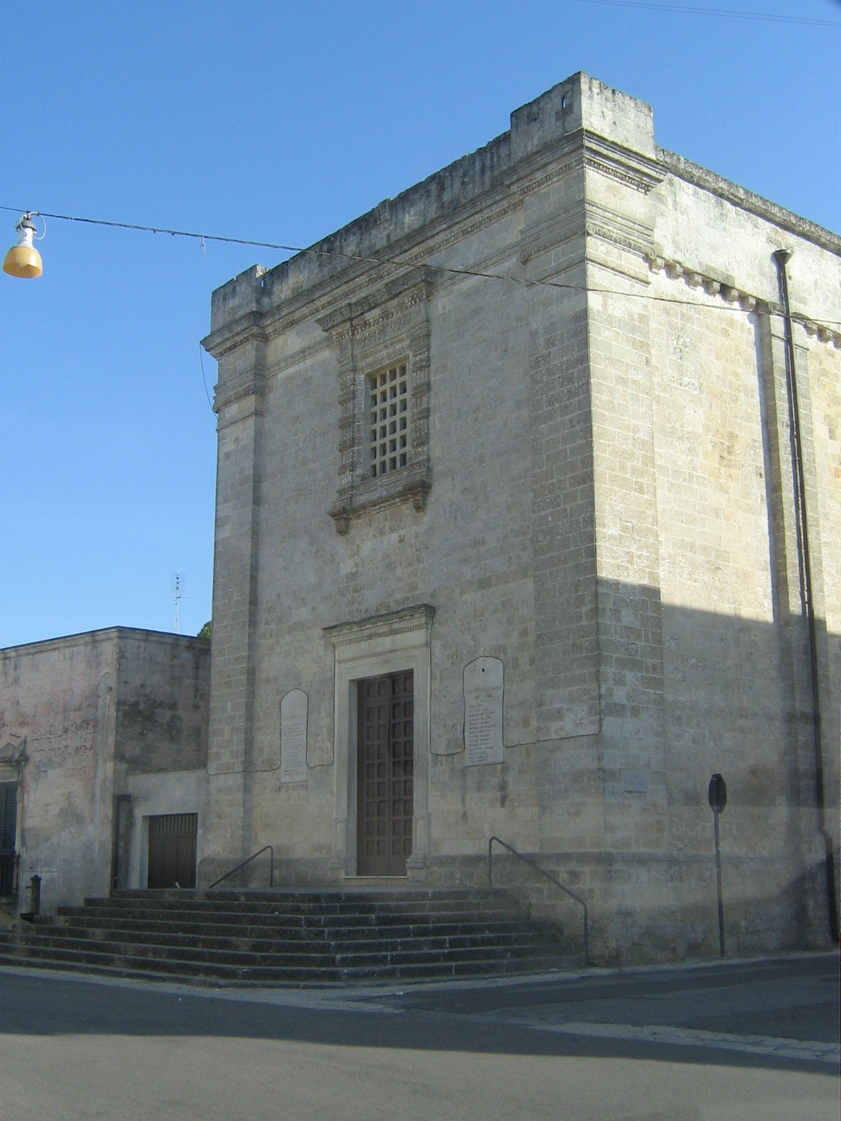 Vignacastrisi, frazione di Ortelle: la chiesa parrocchiale.